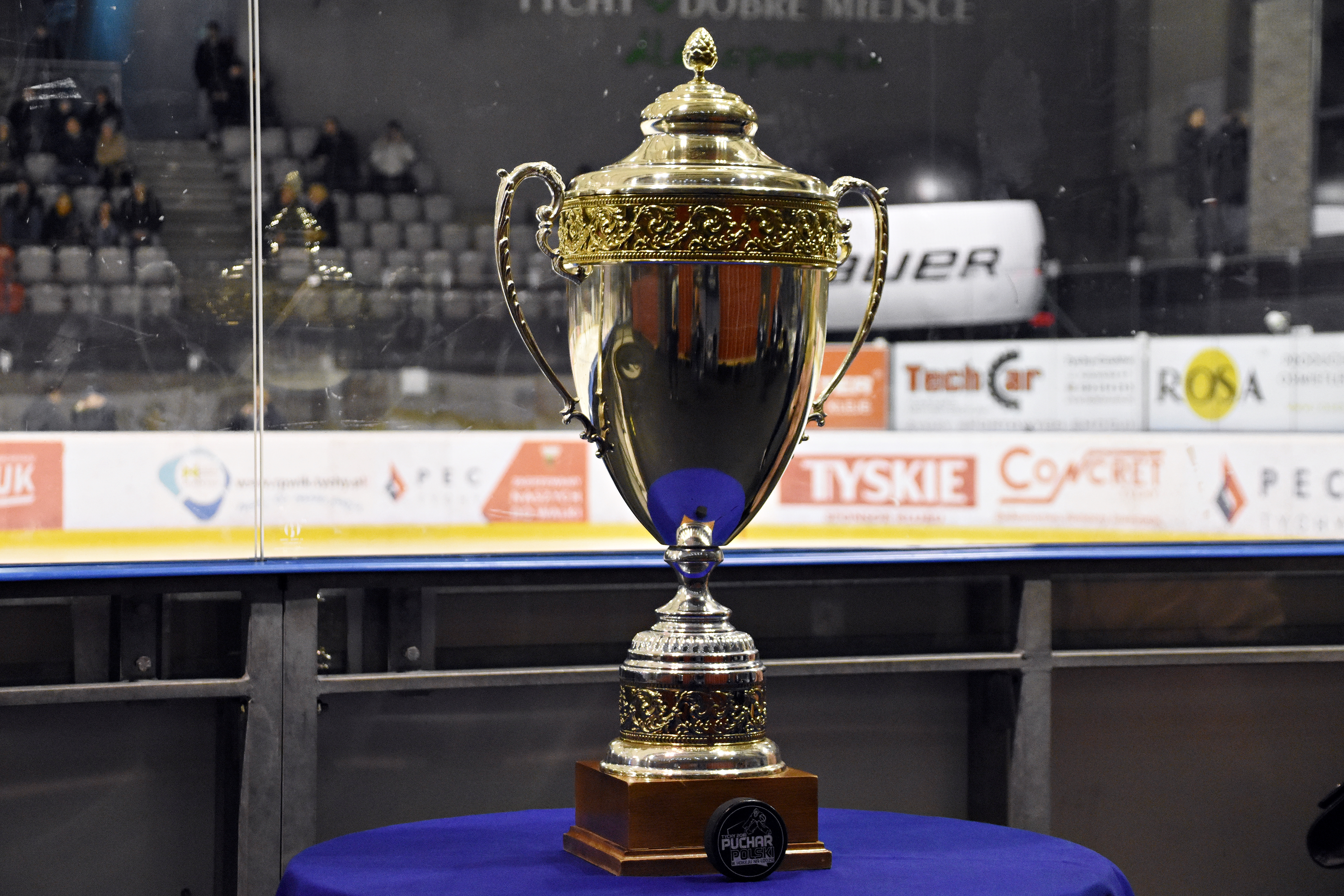 Puchar dla zwycięzcy Pucharu Polski w Hokeju na Lodzie 2017/18